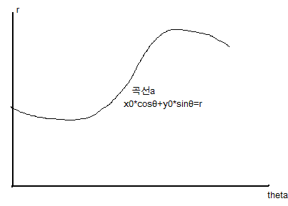 hough tramsform image3